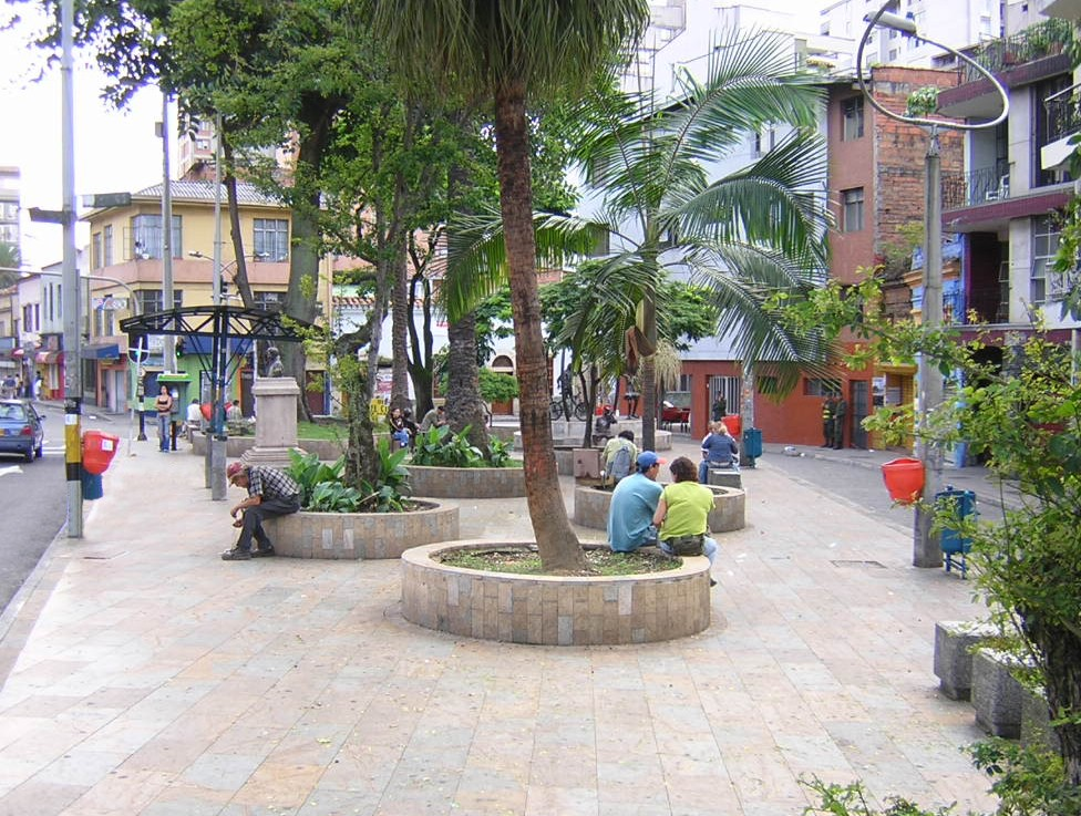 Parque del Periodista, Medellín, Colombia